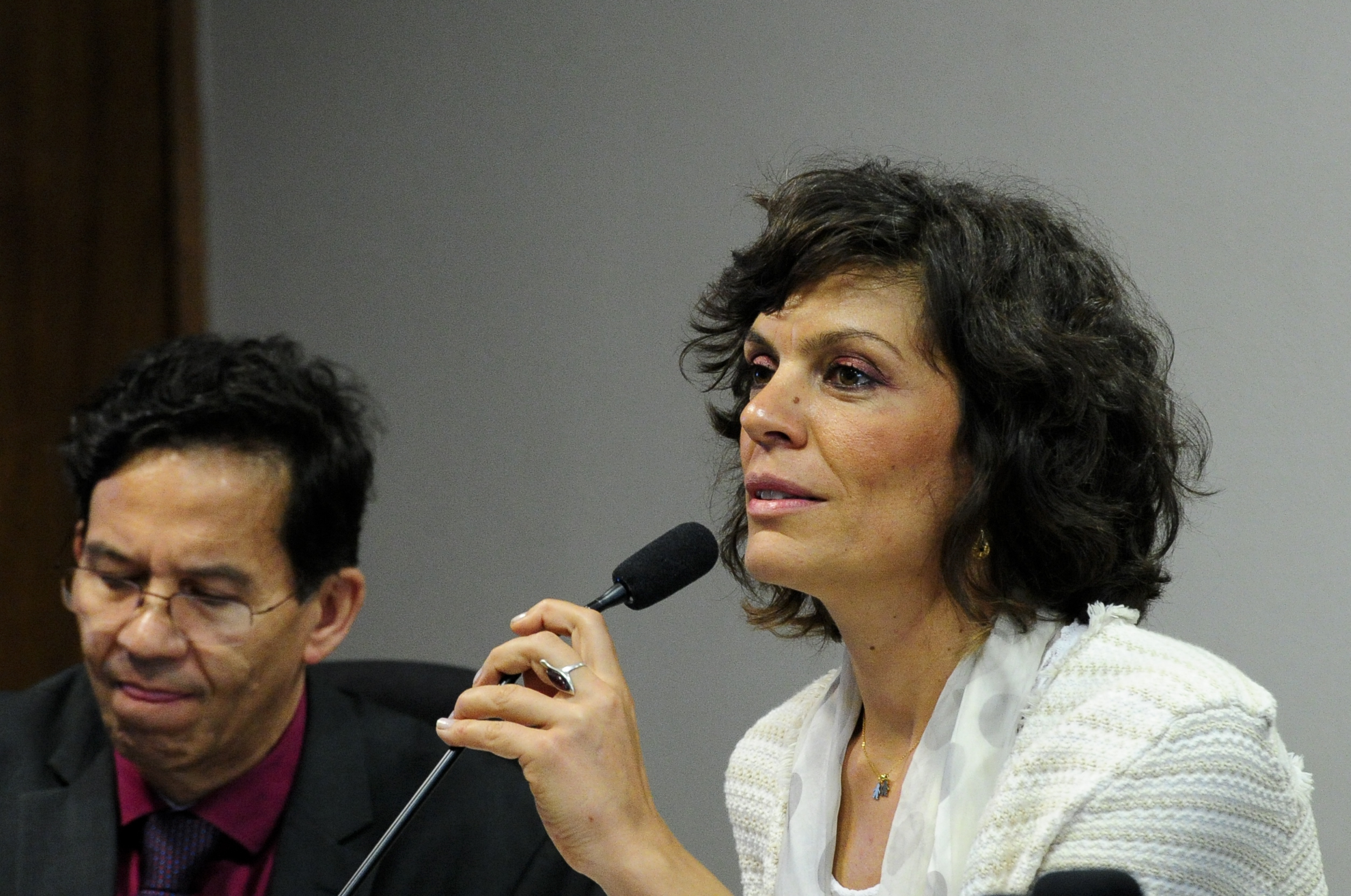 Comissão de Direitos Humanos e Legislação Participativa (CDH) realiza audiência pública interativa para debater sobre: "A securitização de créditos recebíveis". Mesa: professor da Faculdade de Direito da Universidade Federal de Minas Gerais (UFMG) e juiz do Trabalho, Antônio Gomes de Vasconcelos; advogada, coordenadora do Grupo de Estudo sobre Conflitos Trabalhistas e Sociais na Universidade Nova de Lisboa, Raquel Cardeira Varela - em pronunciamento. Foto: Geraldo Magela/Agência Senado